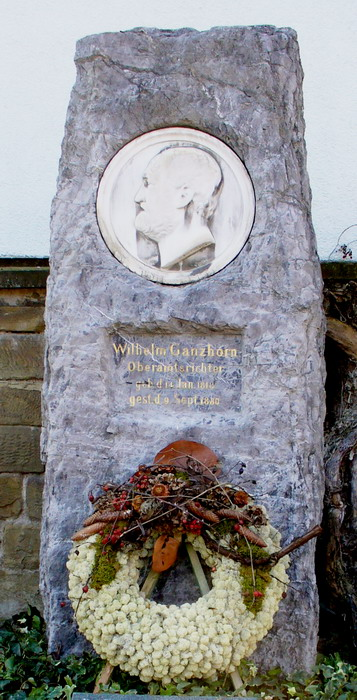 Grabstein Wilhelm Ganzhorns im Uff-Kirchhof, Stuttgart-Bad Cannstatt. Das Grabmal stammt von Rudolf Dietelbach.